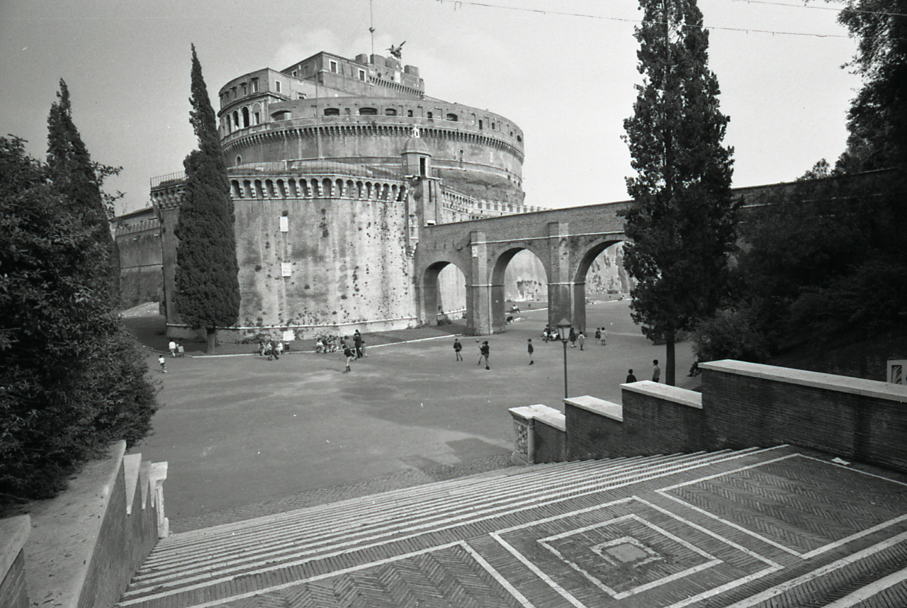 Servizio fotografico : Roma, 1966 / Paolo Monti. - Strisce: 3, Fotogrammi complessivi: 13 : Negativo b/n, gelatina bromuro d'argento/ pellicola ; 35 mm. - ((I fotogrammi hanno una doppia numerazione. - Sul portanegativi: Leica V Adox 17. - Occasione: Pubblicazione: "Emilio CECCHI, Natalino SAPEGNO (a cura di), Storia della Letteratura Italiana, 9 voll., Milano, Garzanti, 1966 e segg."